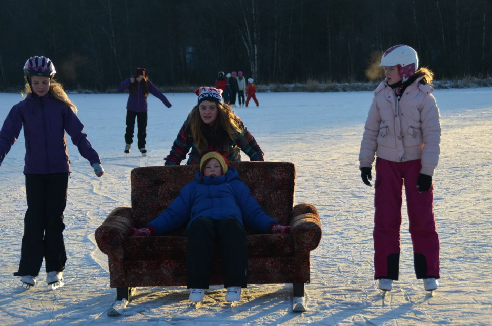 Gerd-Guro med ski på beina på isen